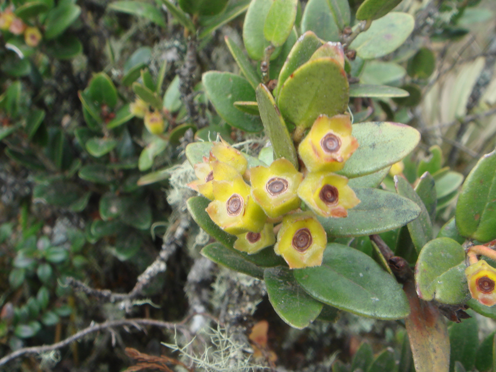 (Disterigma alaternoides) Páramo de Guasca, Cundinamarca, Colombia.